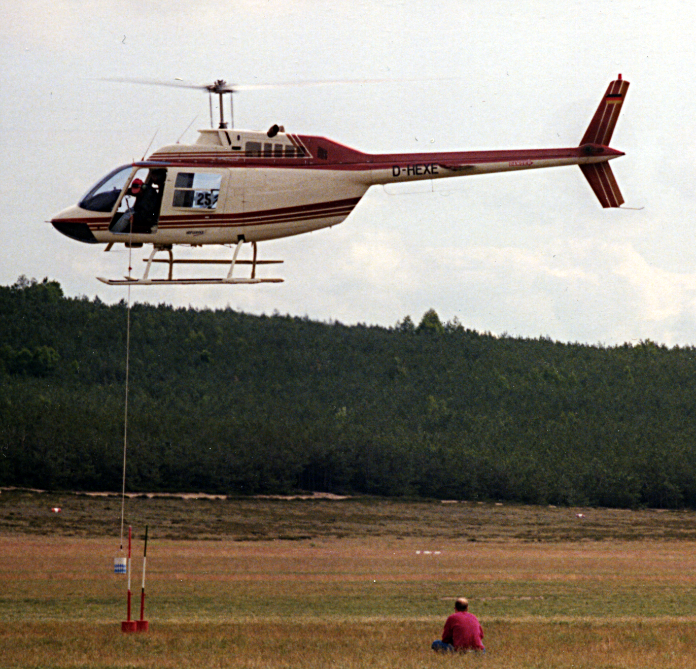 Helikopter bei der ODHM in Schönhagen (südlich Berlin)